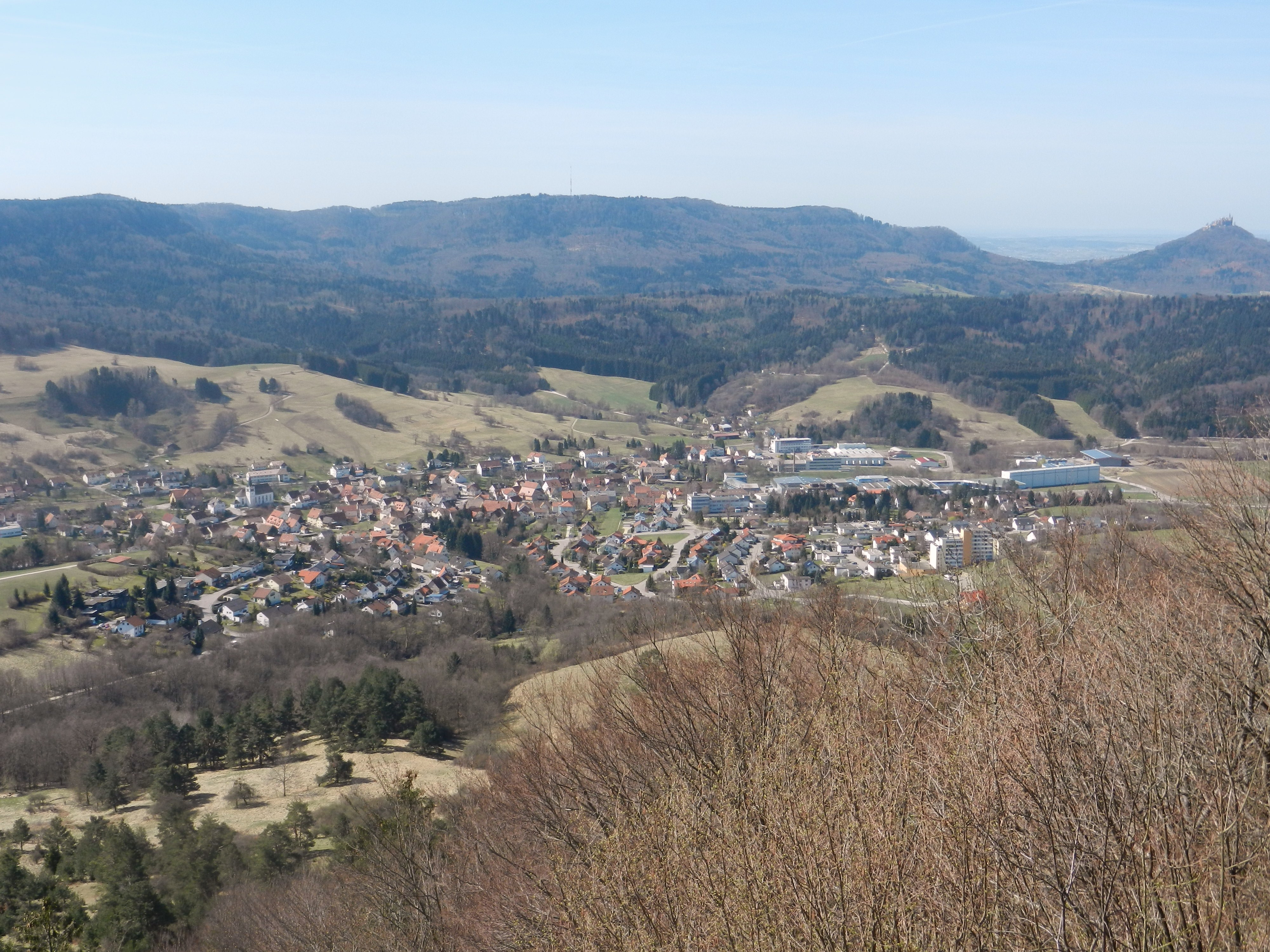 Jungingen, im Hintergrund die Burg Hohenzollern (rechts) und der Raichberg (mitte)